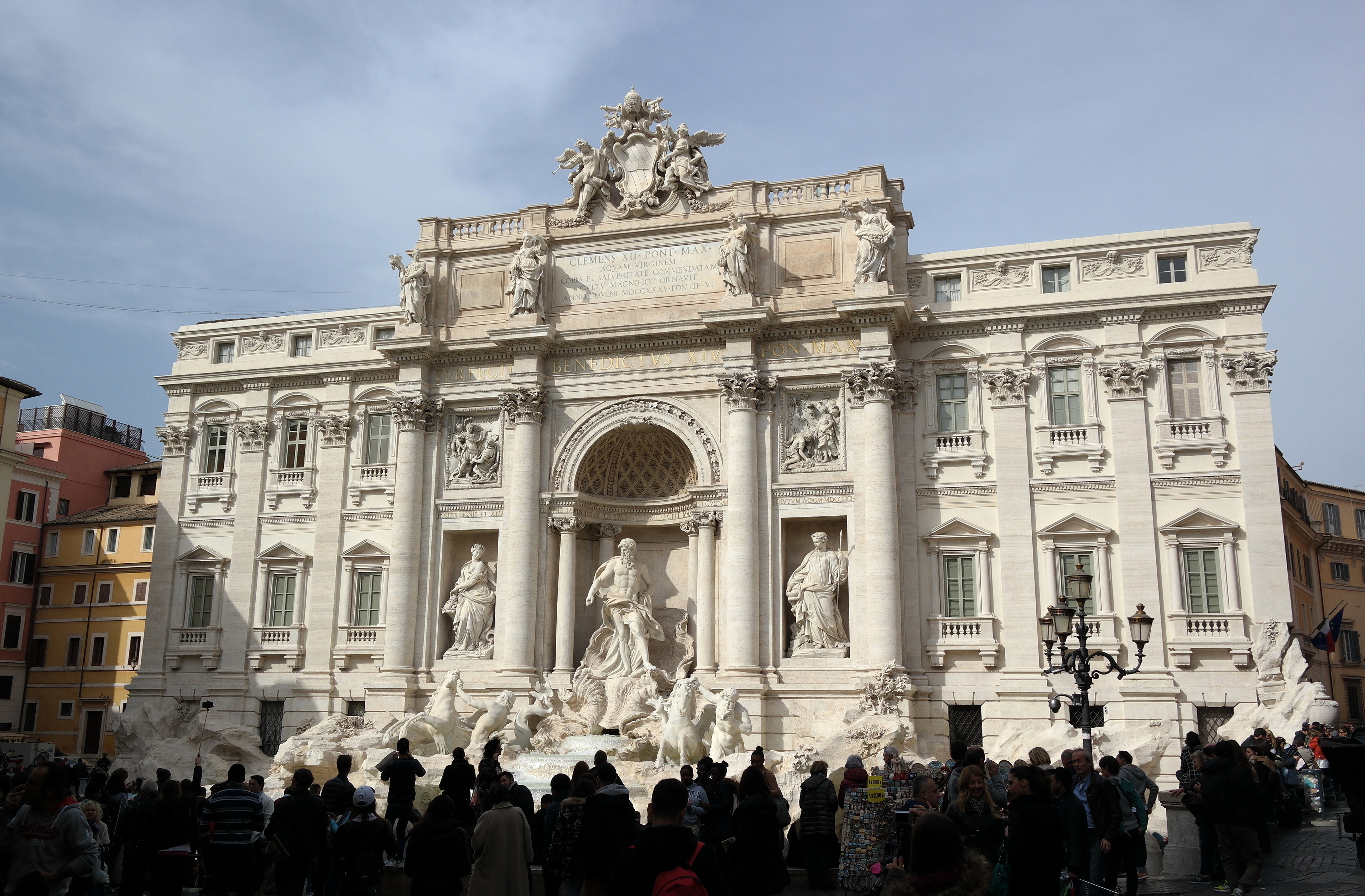 Fontana di Trevi, inglobata nel Palazzo Poli, a Roma